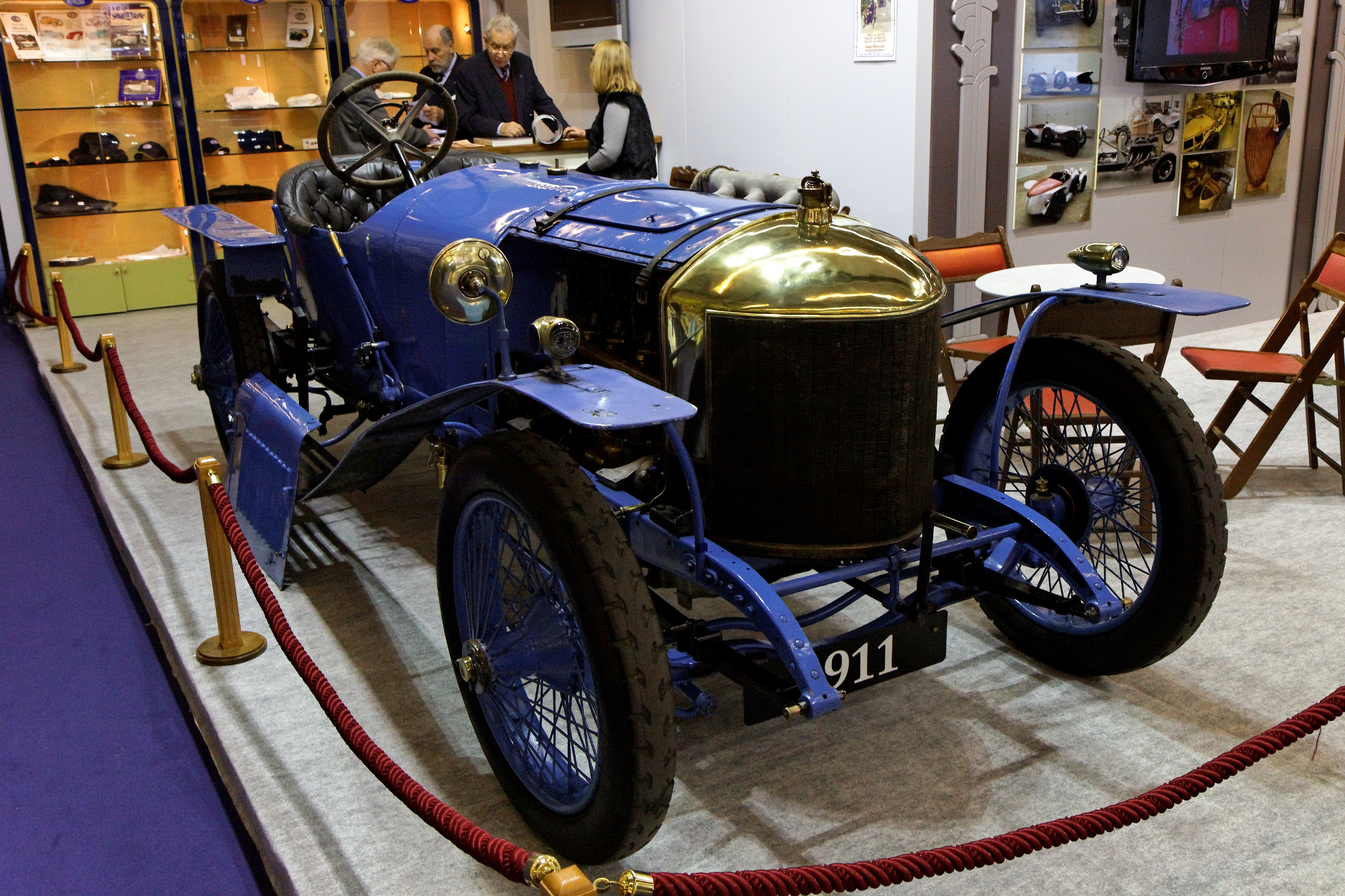 Photographie prise lors du salon rétromobile 2011 à Paris, porte de Versailles.